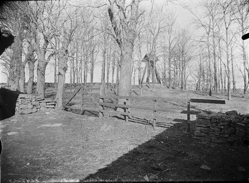 Kyrkplatsen med klockstapel.